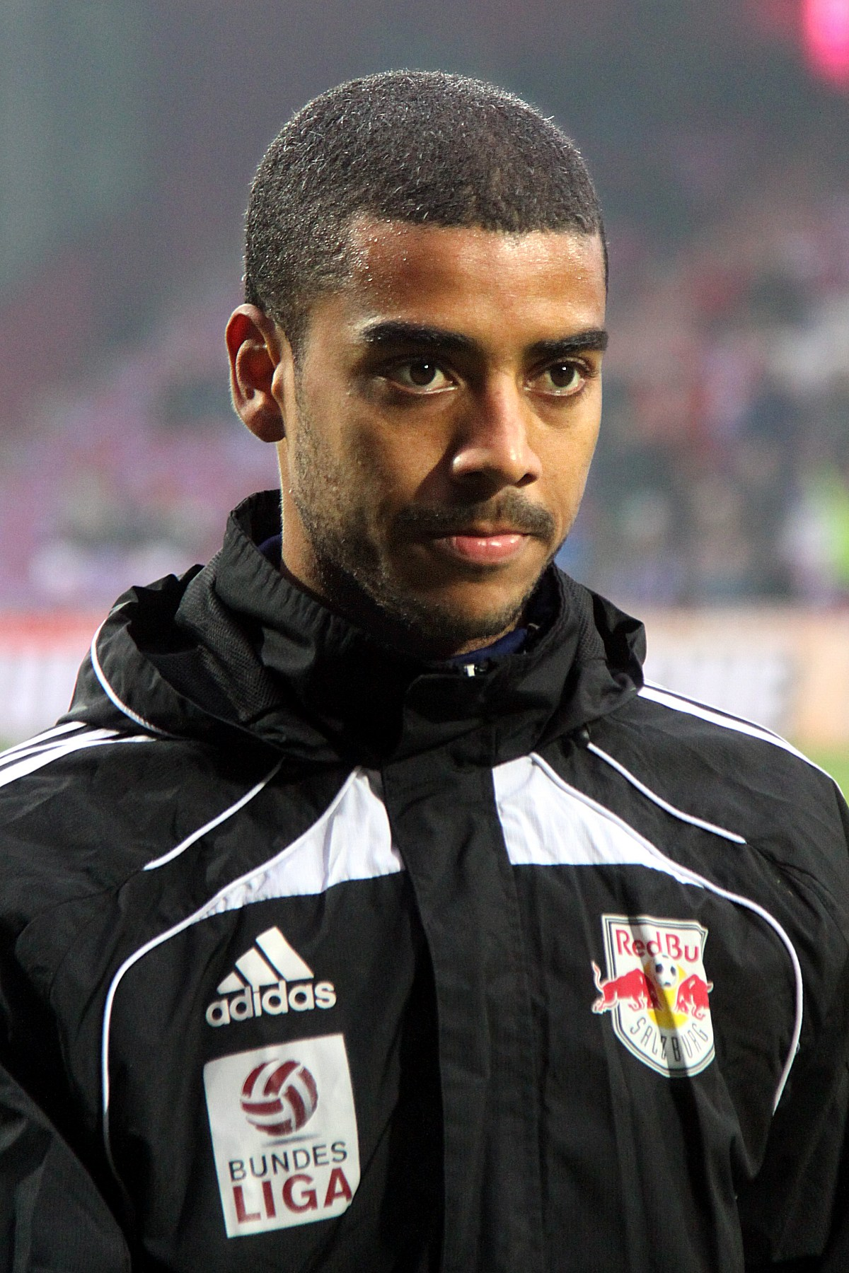 Meisterschaftsspiel der österreichischen Bundesliga: FK Austria Wien gegen FC Red Bull Salzburg (0:0) am 6. Oktober 2013 in Wiener Generali Arena. - Das Foto zeigt Alan Douglas Borges de Carvalho (FC Red Bull Salzburg).